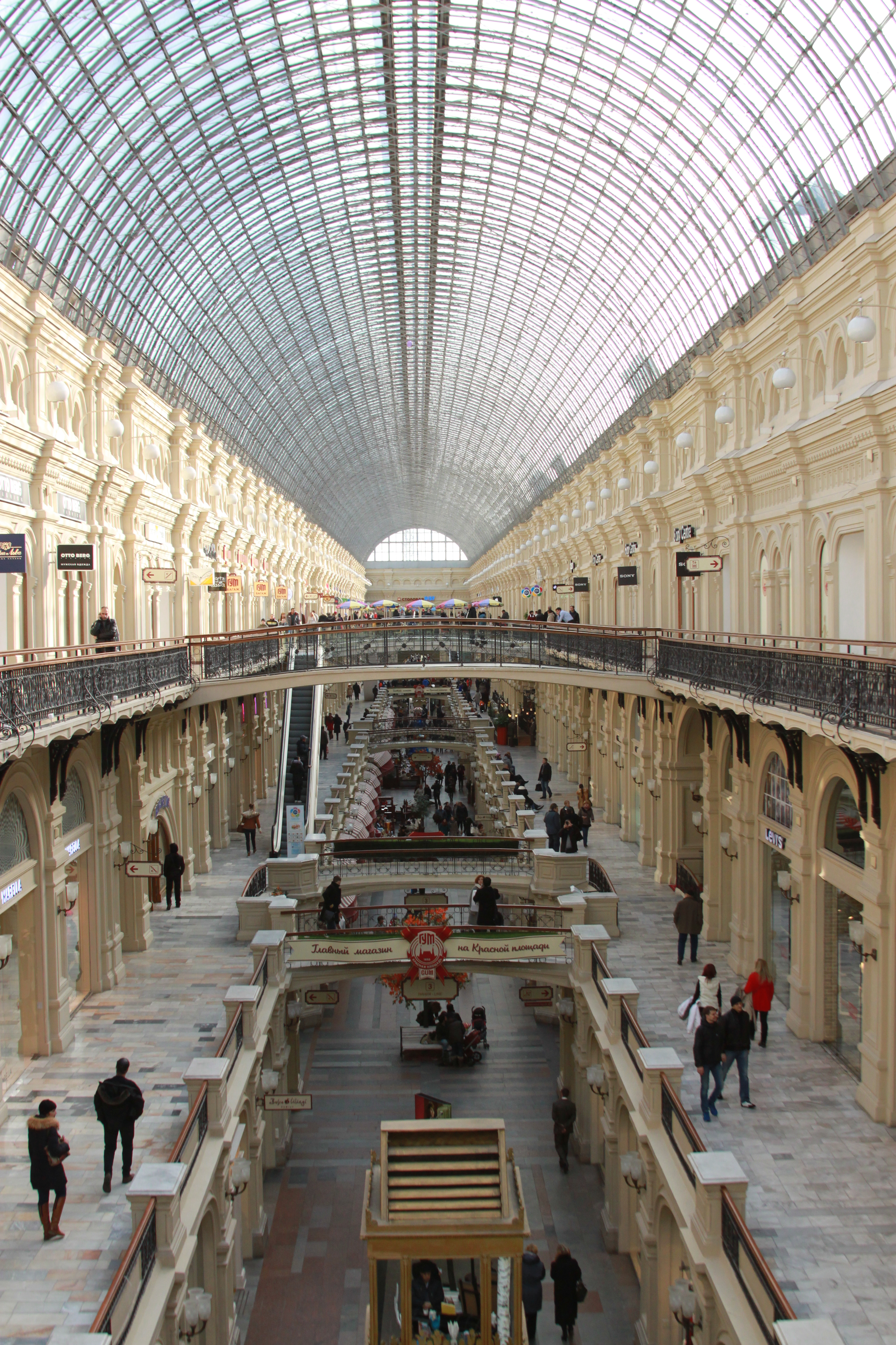 2014 Moscow GUM Москва ГУМ третий этаж 3-я линия